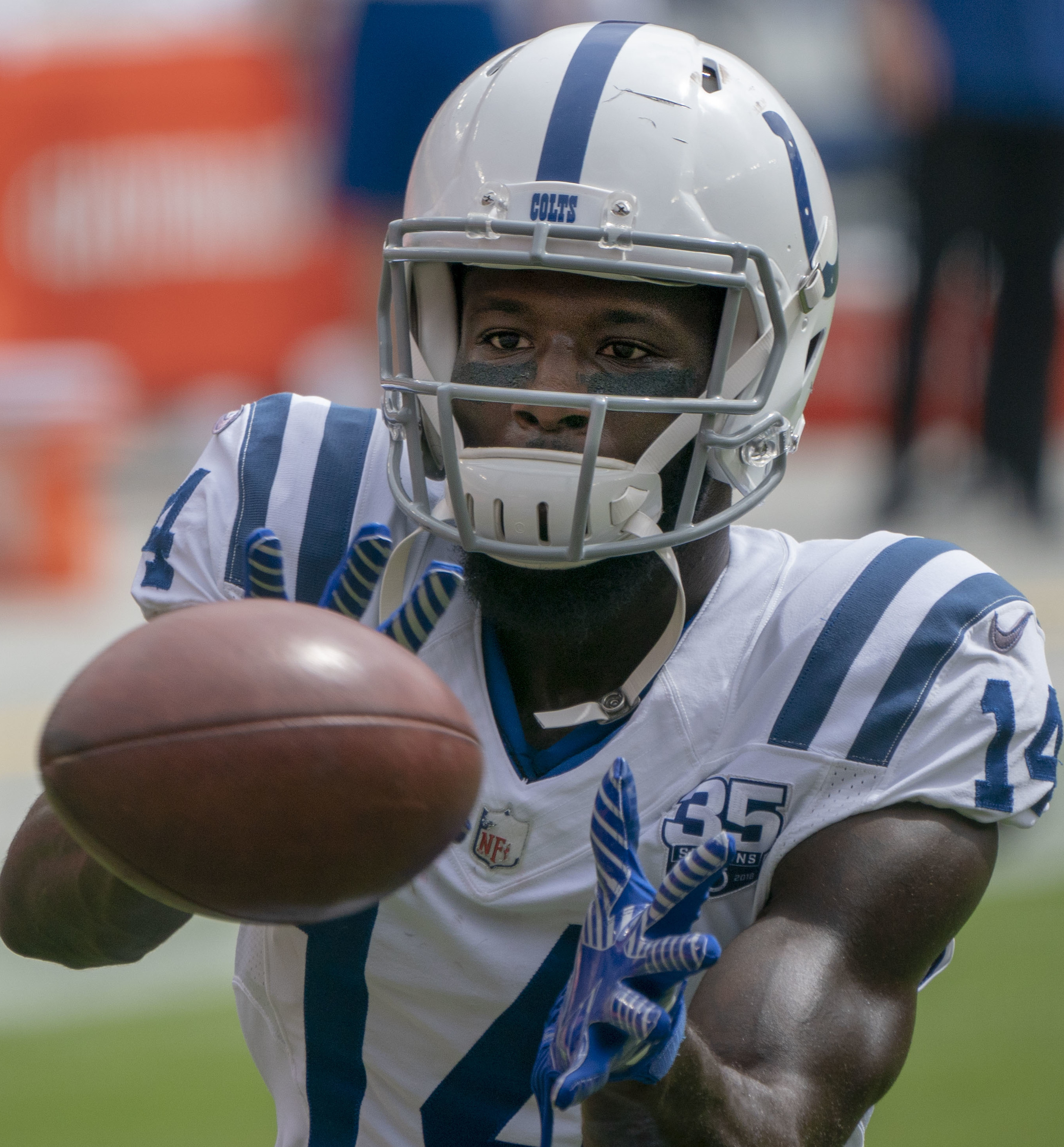 Colts at Redskins 09/16/18